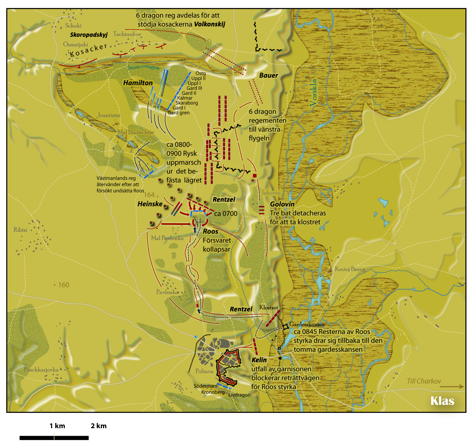 Illustration: Klas Sandberg. Källa: Karl XII på slagfältet